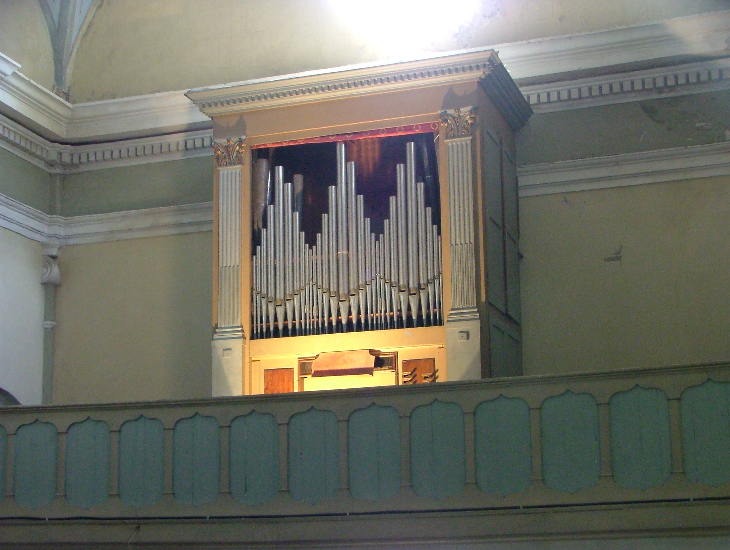 Buffet de l'orgue